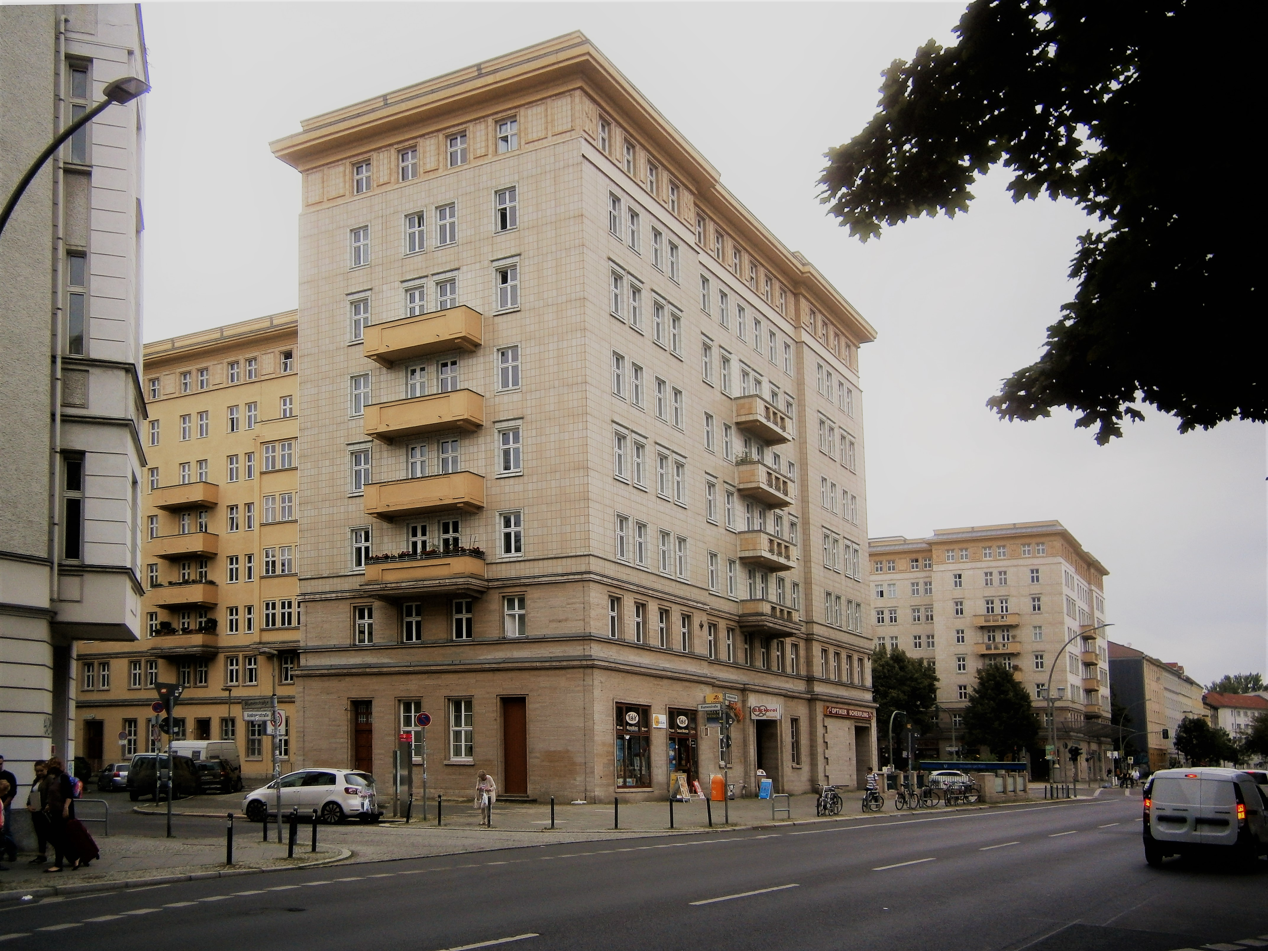 Die Andreasstraße ist eine Straße im Berliner Bezirk Friedrichshain-Kreuzberg, Ortsteil Friedrichshain. Angelegt wurde sie 1862 auf vorherigen Gartenland und 1863 benannt. Bis um 1900 waren die Grundstücke bebaut und bis 1930 wurde verdichtet. Bei Luftangriffen im Zweiten Weltkrieg wurde die Gebäude schwer getroffen. So ist die Straße seit den 1950er Jahren mit wiederhergestellten Altbauten, aber besondres durch Plattenbau-Wohnblöcke aber seit 1990 auch durch Hotel- und Bürobauten im Umfeld des Ostbahnhofs charakterieisiert. Das Bild zeigt: Andreasstraße 46, zusamen mit dem Block B Süd der Stalinallee erbaut. Das Haus steht zwischen Karl-Marx-Allee und Blumenstraße.